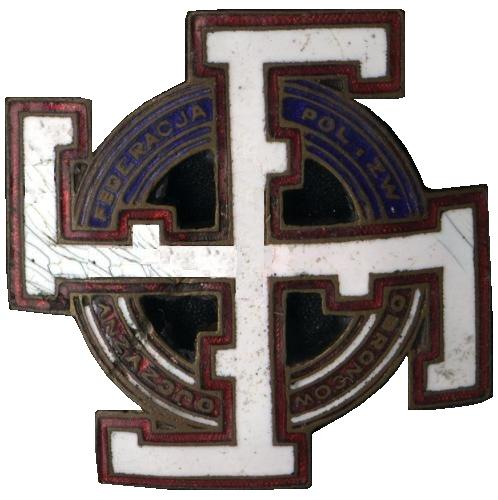 Federacja Polski Związek Obrońców Ojczyzny - II RP orgalizacja legionowa polish sign (MSW nr. 24, poz. 285 z 1929r.)